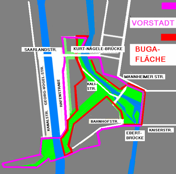 Heilbronn Standort der geplanten neuen Vorstadt nördlich der Bahnhofsstraße am ehemaligen Floßhafen und Standort der Bundesgartenschau 2019 .PNG